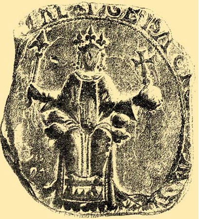 Gejza II. - pečeť